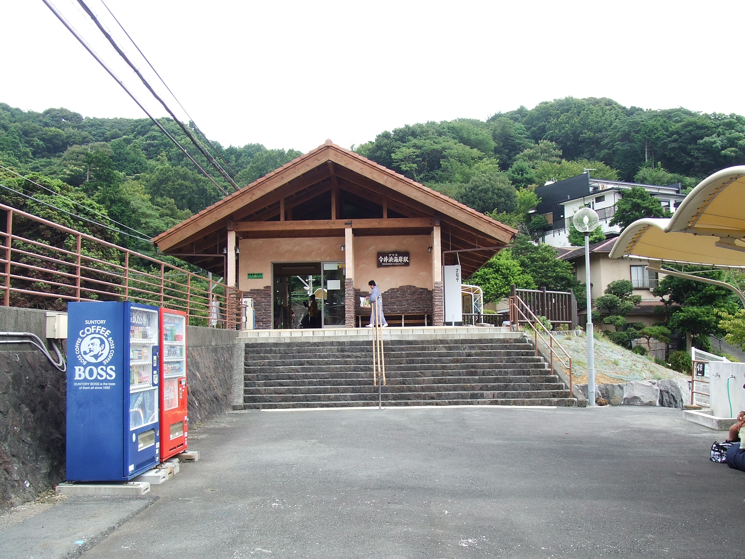 Imaihama-Kaigan Station in Kawazu, Shizuoka, Japan